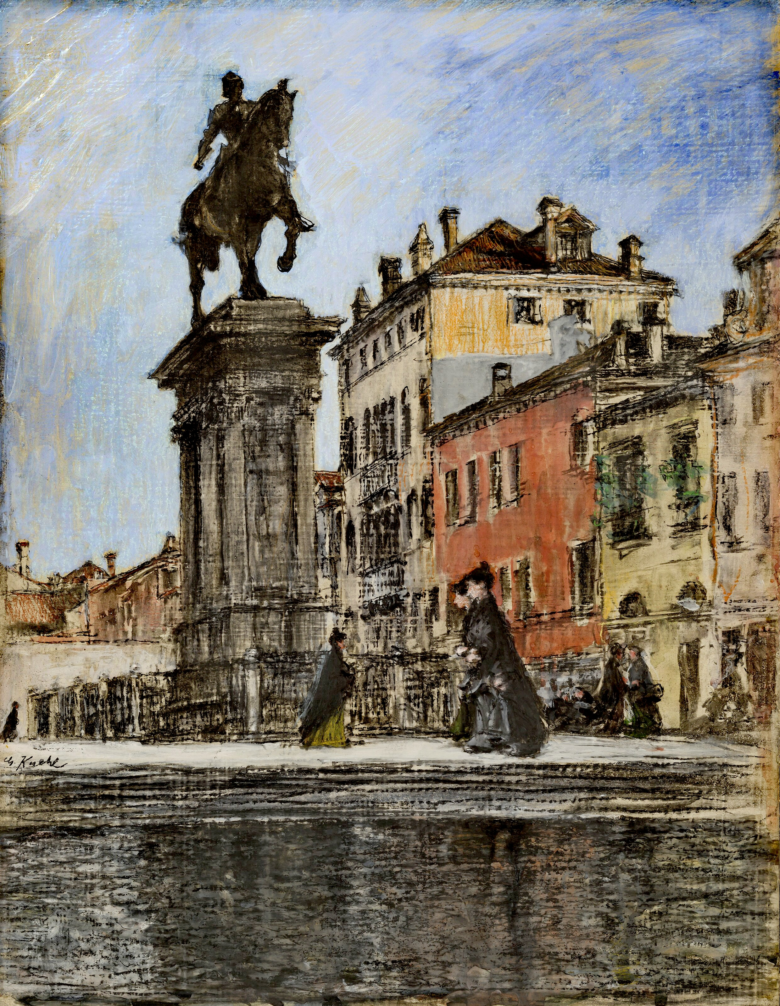 Gotthardt Kuehl: Denkmal des Colleoni in Venedig. Aquarell, Pastellkreiden, Kohle und Graphit auf Malkarton, 45,5 x 35 cm, links unten signiert